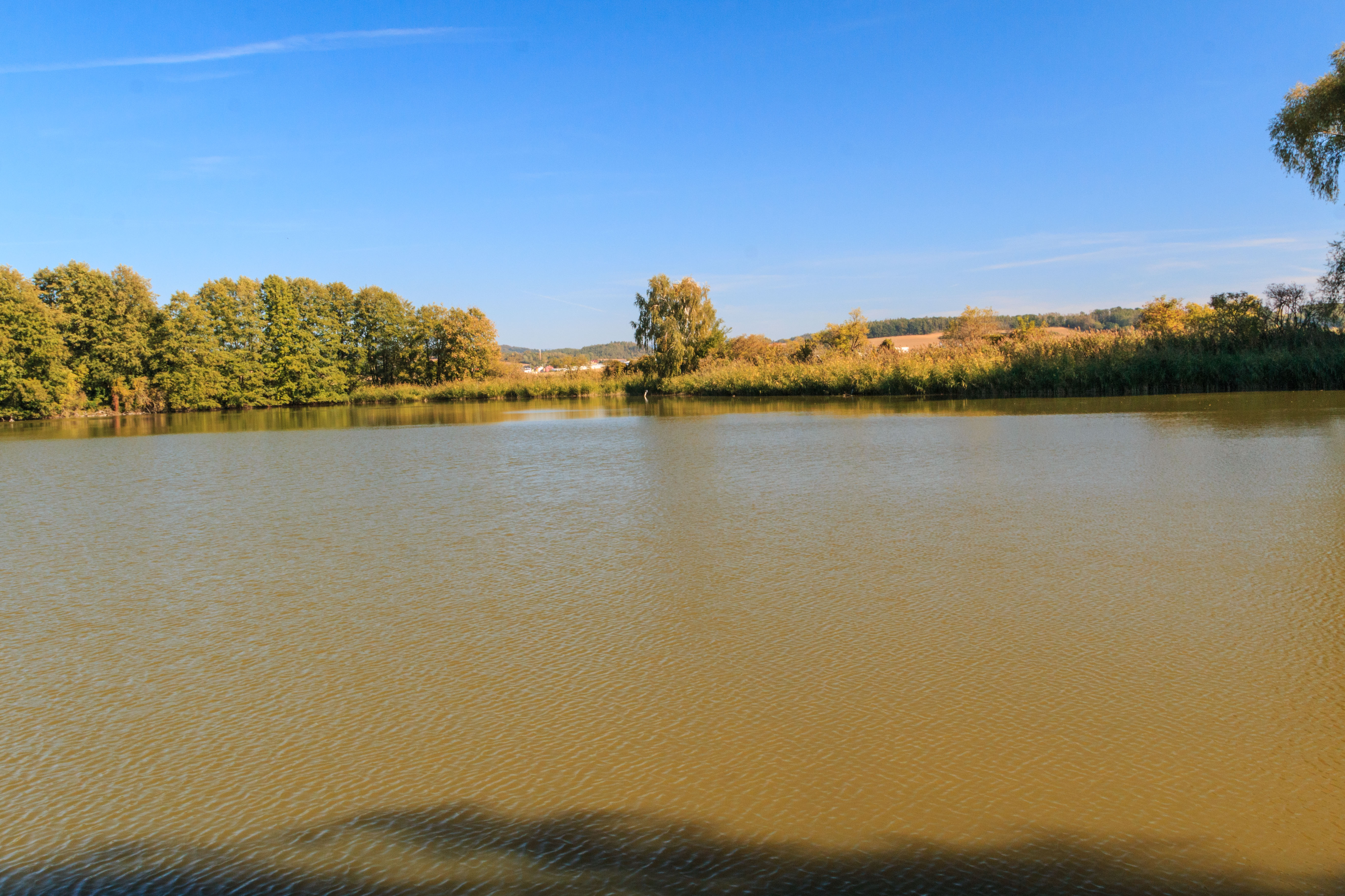 Býčinský rybník Project: Vodstvo